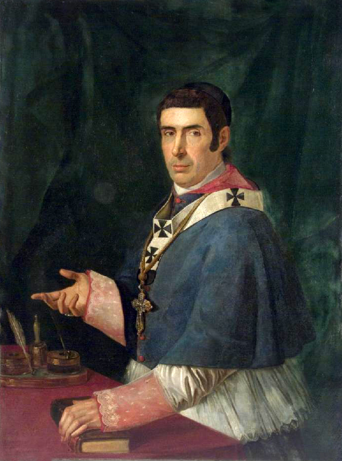 Ritratto di Monsignore Michele Basilio Clary